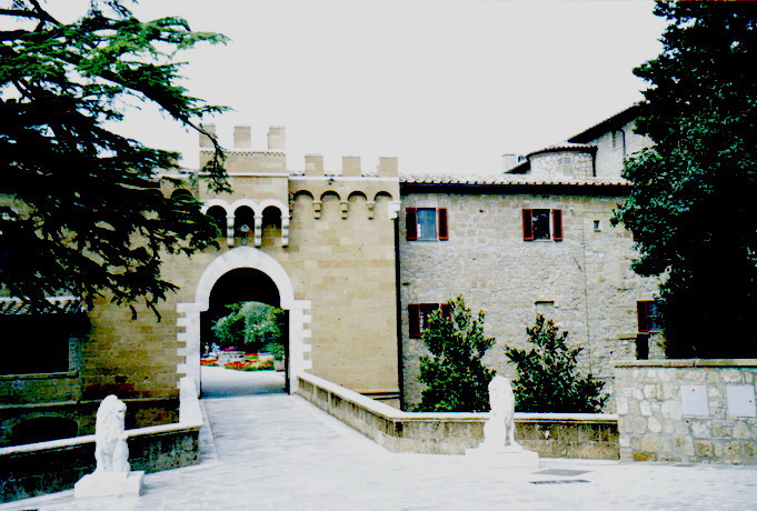 descrizione: Il Castello di Montorio nei pressi di Sorano